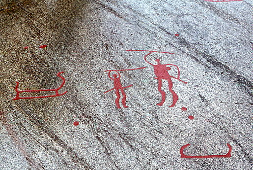 Gravure préhistorique de Tanum, Suède